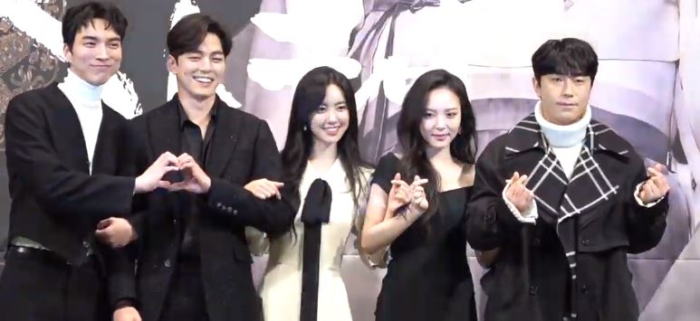 TV조선 특별기획드라마 ‘간택:여인들의 전쟁’ 제작발표회가 12일 오후 서울 강남구 논현동 임피리얼 팰리스 호텔에서 열렸다.